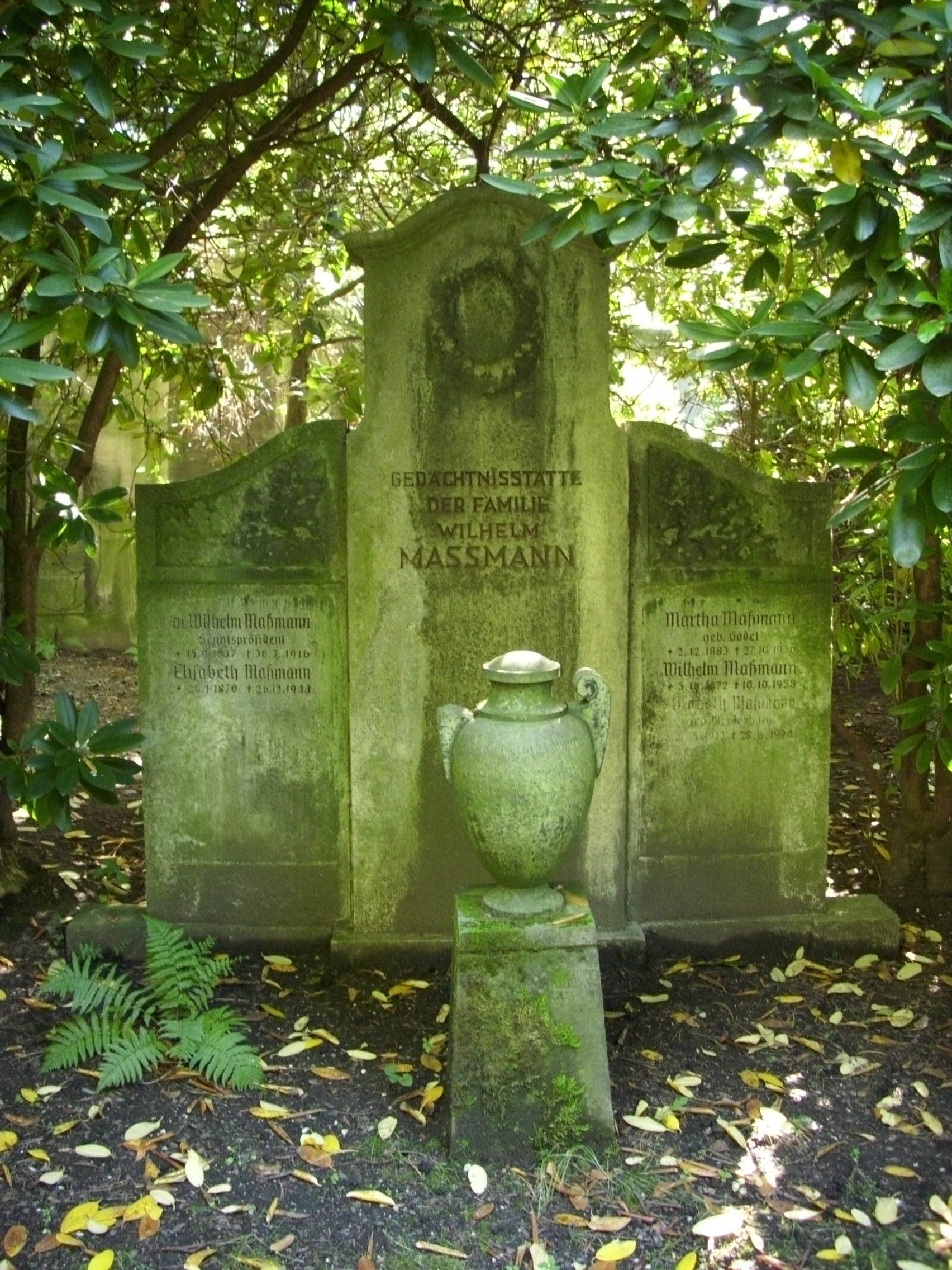 Grabstätte Wilhelm Maßmann und Angehörige